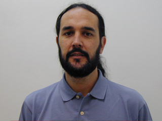 Pablo Sebastián López, diputado.